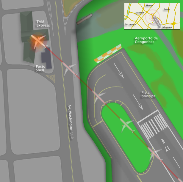 Trajetória final do Vôo TAM 3054.